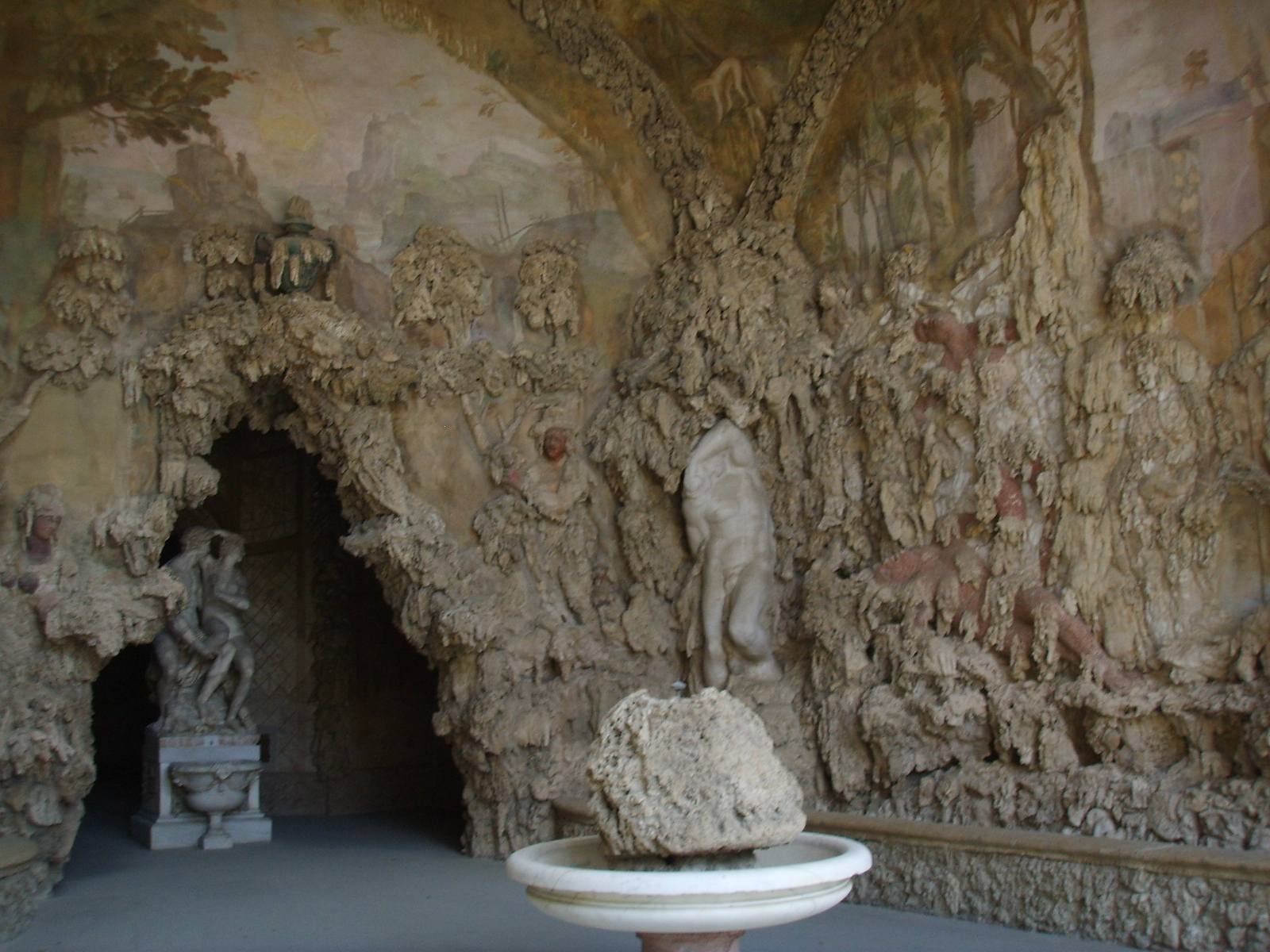 Grotta del buontalenti, prima sala